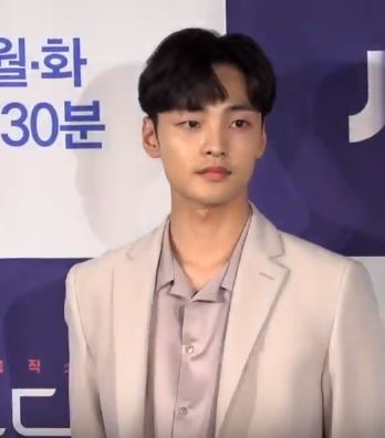 16일 오후 서울 영등포구 여의도 콘래드 호텔 파크볼룸에서 JTBC 새 월화드라마 ‘조선혼담공작소 꽃파당’ 제작발표회가 열렸다.